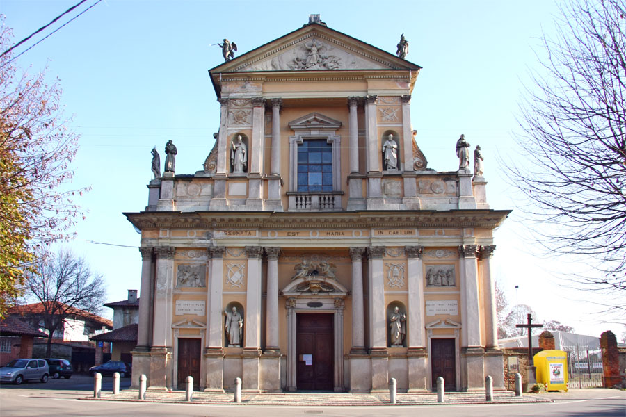 Santuario della Beata Vergine Assunta a Loreto, Oleggio